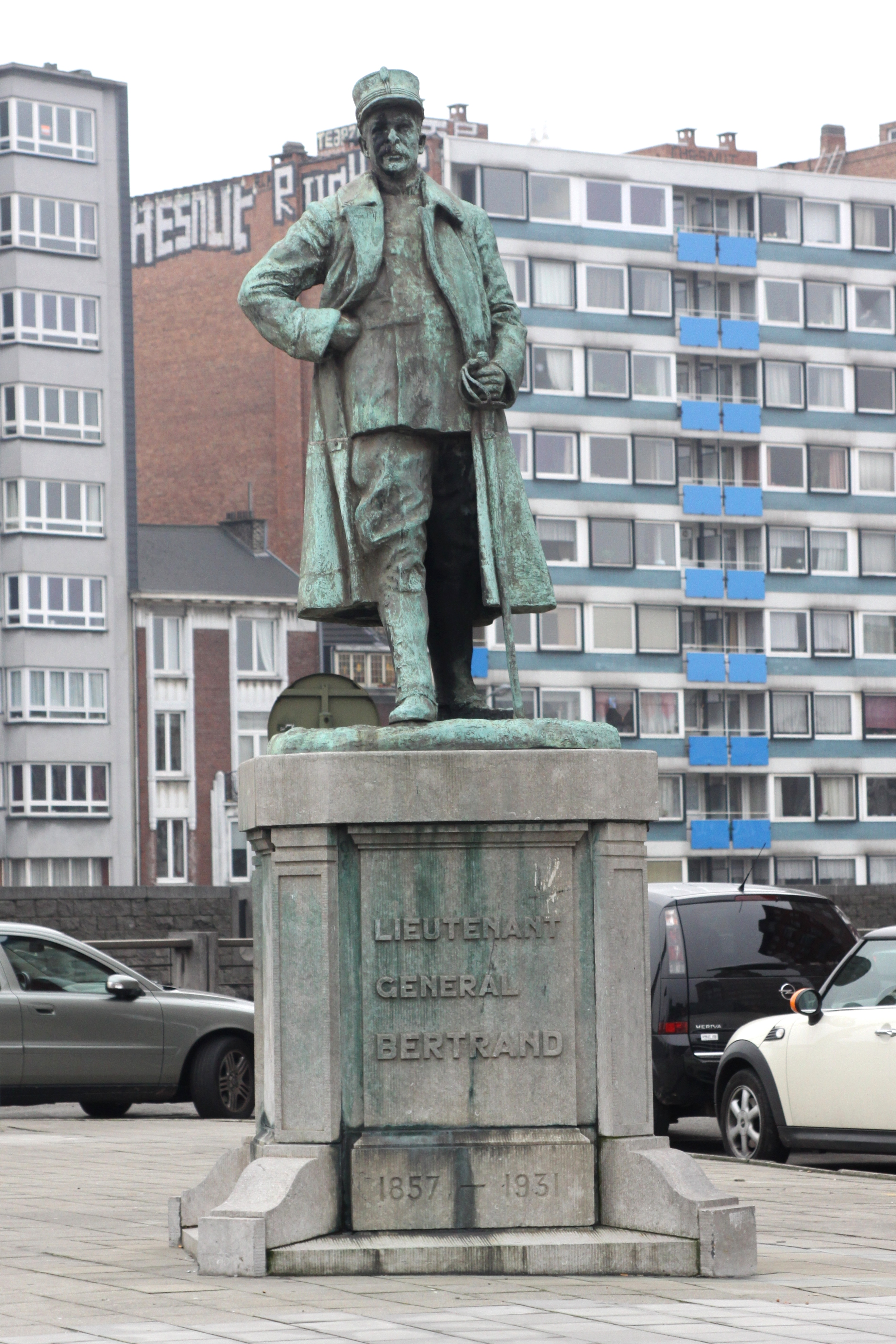 Monument du général Joseph Bertrand prés du pont d'Amercoeur à Liège. (Dérivation, rive droite)